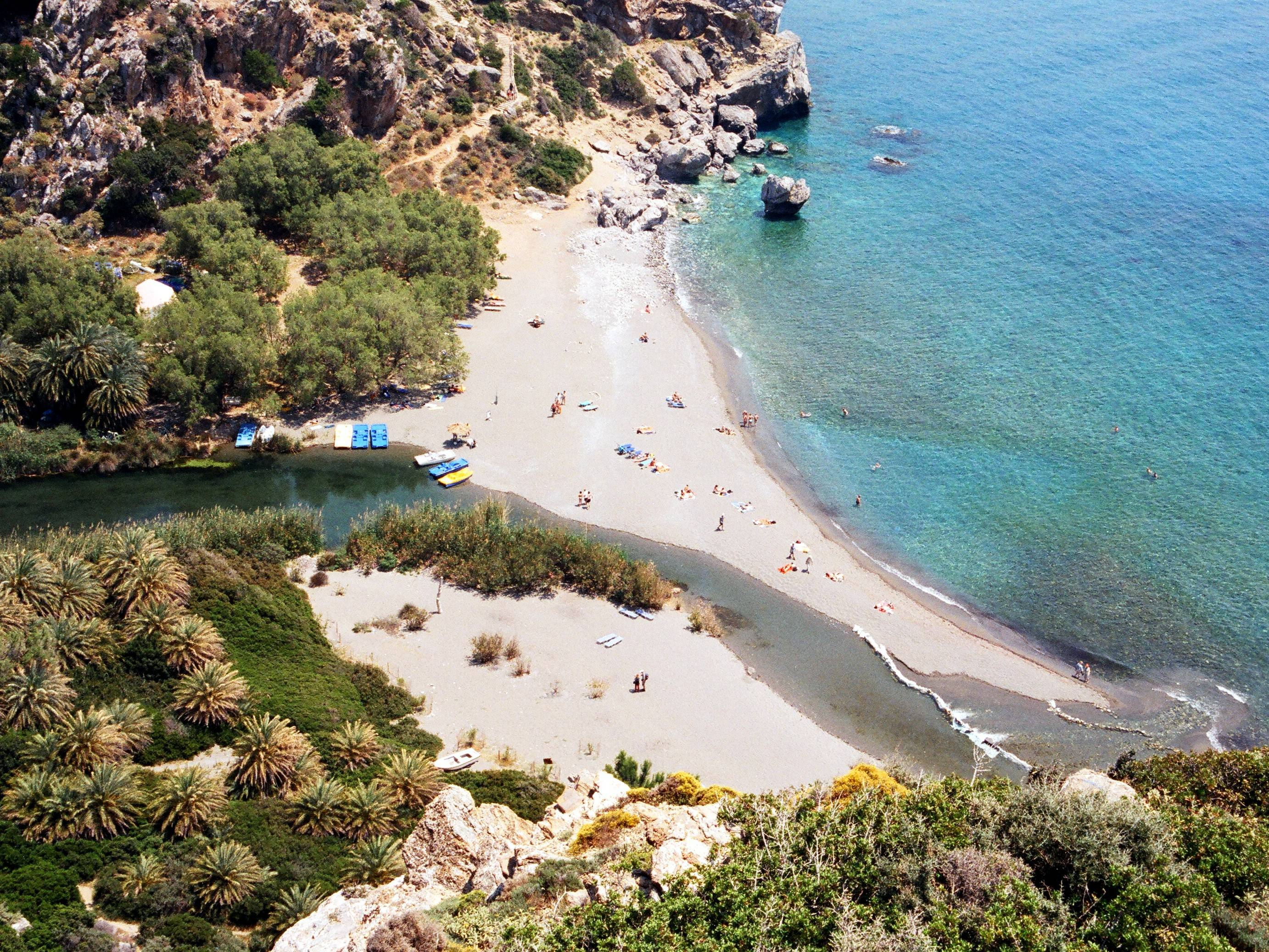 Strand von Preveli, Kreta (Griechenland